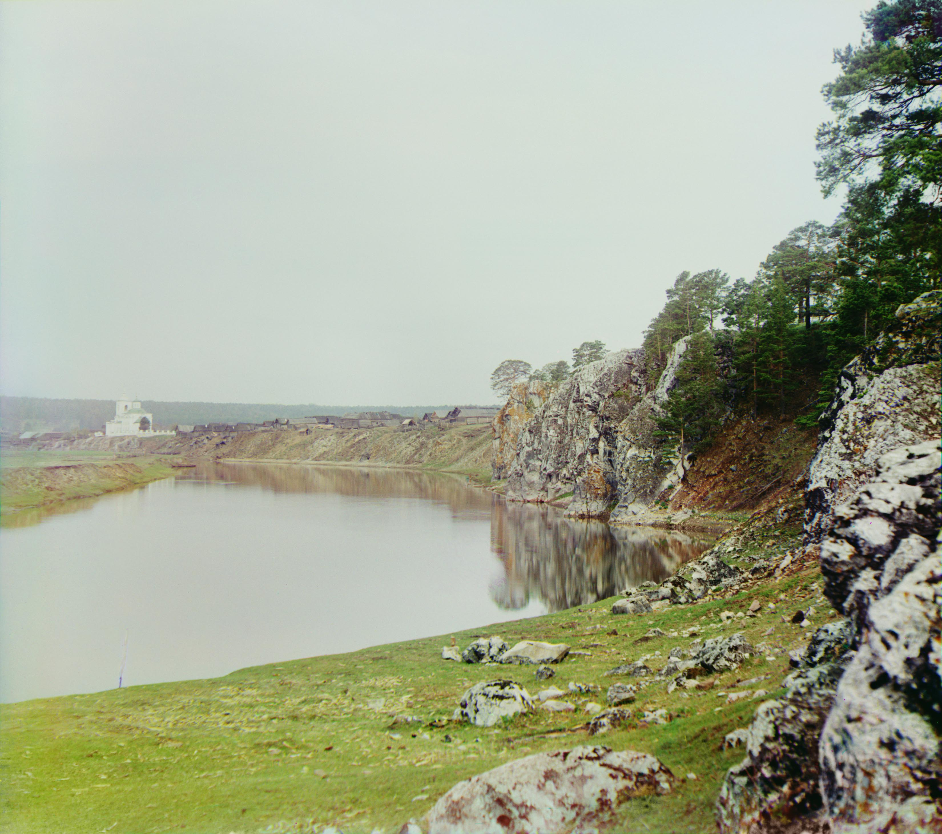 Верхний "Георгиевский камень" [и общий вид слободы "Утка". Река Чусовая.]